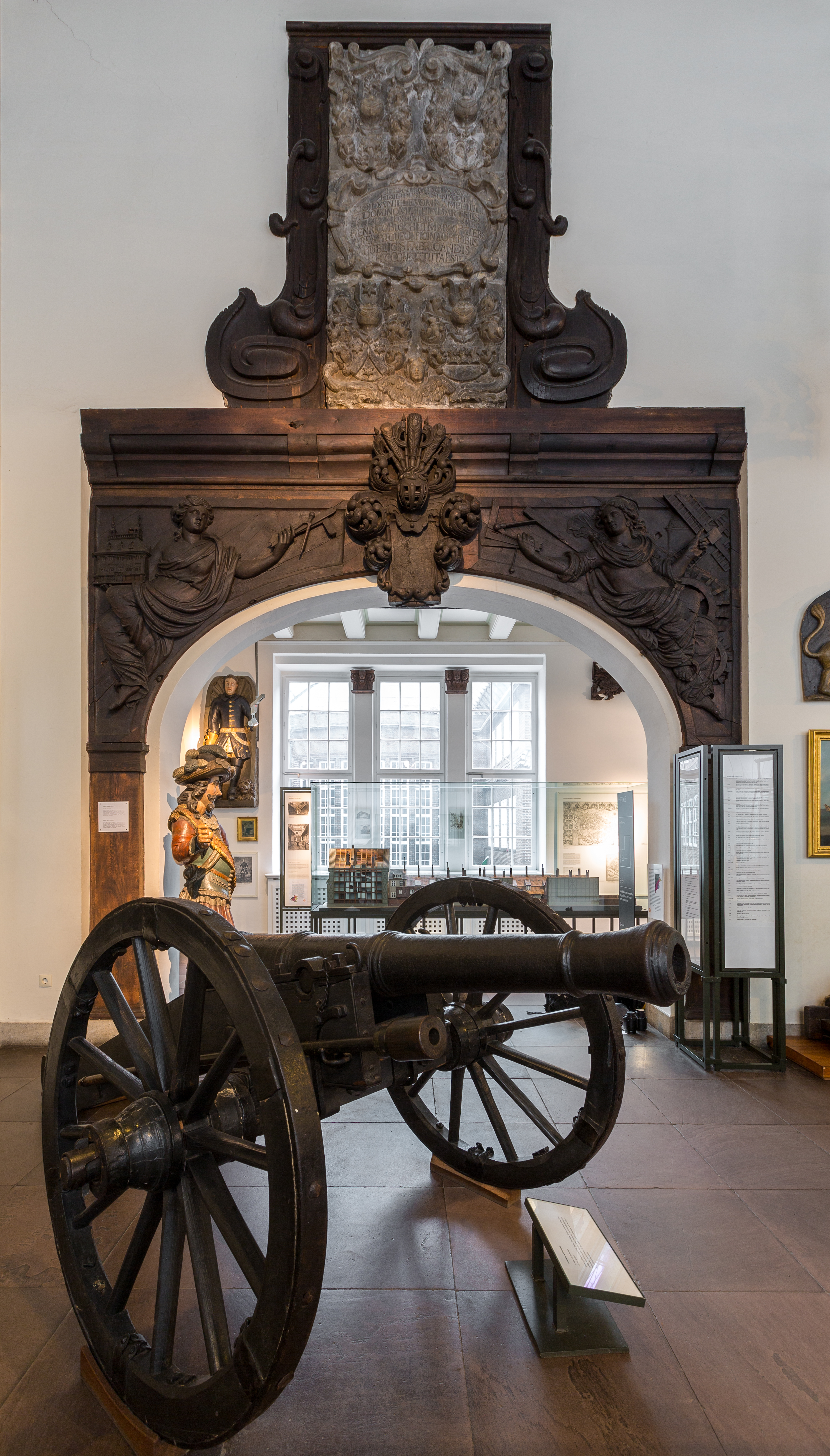 Hauptportal des Bauhofs am Deichtor in Hamburg, Deutschland.